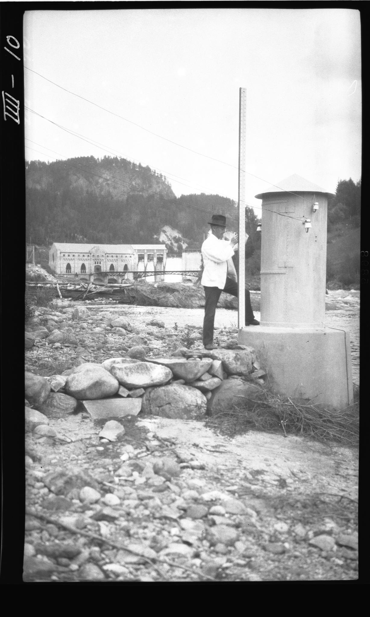 Image Note: Self-recording hydrometer. In the background: Lienfoss powerplant. Bildenotat: Selvregistrende vannmåler. I bakgrunnen: Lienfoss kraftstasjon. Date/Dato: 1923 Photograph/Fotograf: Skjørten, Olav Feel free to use the photos, but please make sure you attribute the photographer and mention NVE as the source. Bruk gjerne bildene, men vennligst oppgi fotografens navn og angi NVE som kilde. Format: Negative/Negativ Archive/Arkiv: Hydrologisk avdeling Image ID/Bilde ID: UNV_N - IV-010